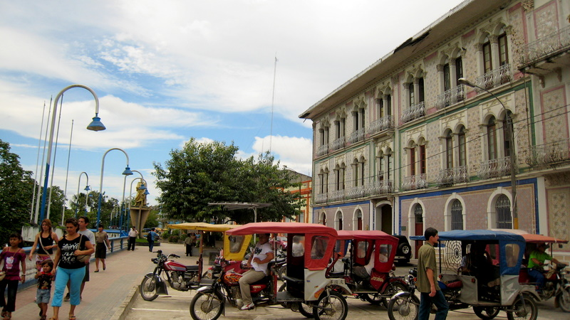 El Malecón Tarapacá en Iquitos.